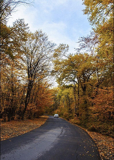 النگدره در پاییز